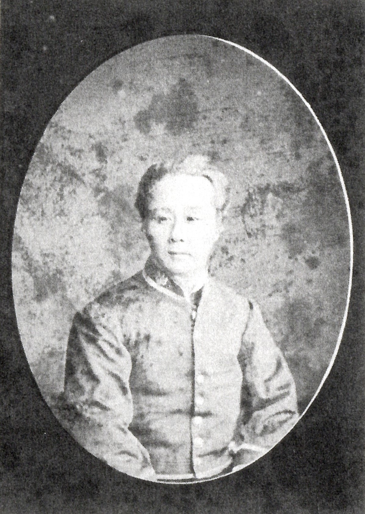 伊東長としの肖像写真。